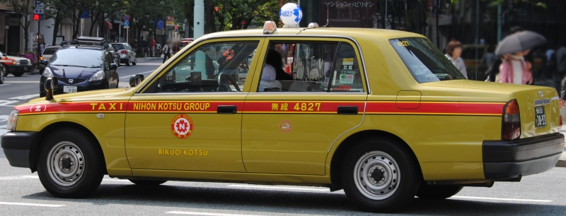 陸王交通のタクシー（日本交通グループ加盟後）